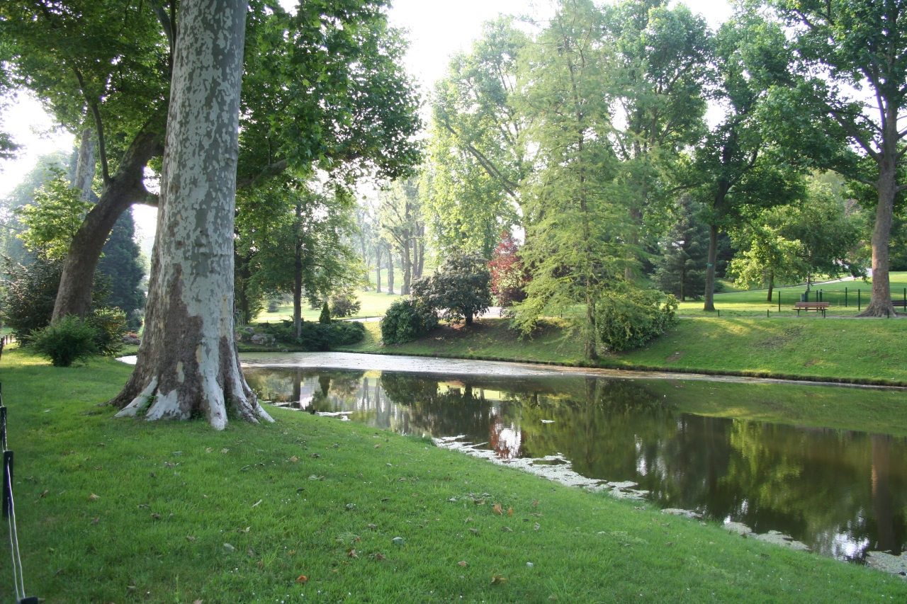 Parc Meissonier à Poissy - Yvelines (France)